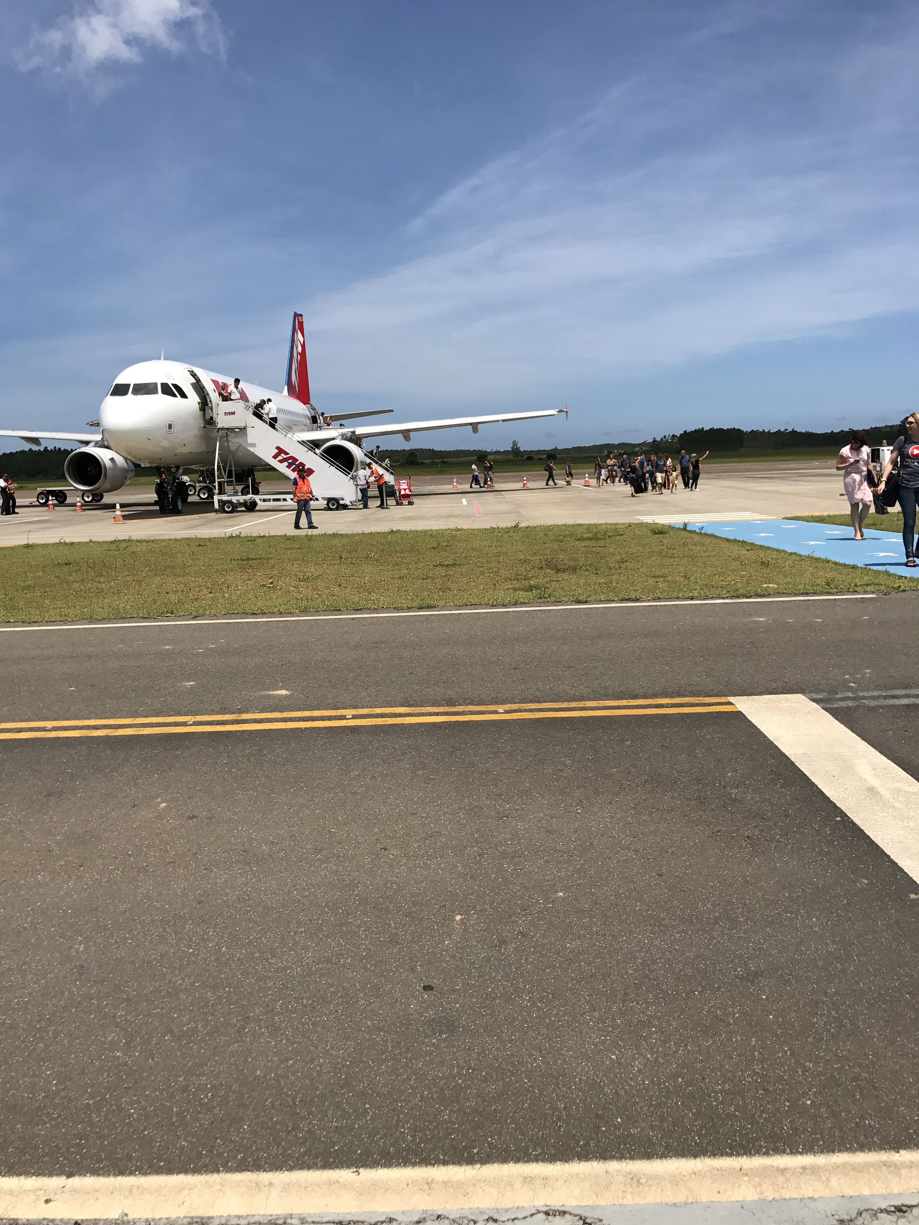 Aeronave da LATAM Airlines em solo do SJBA.